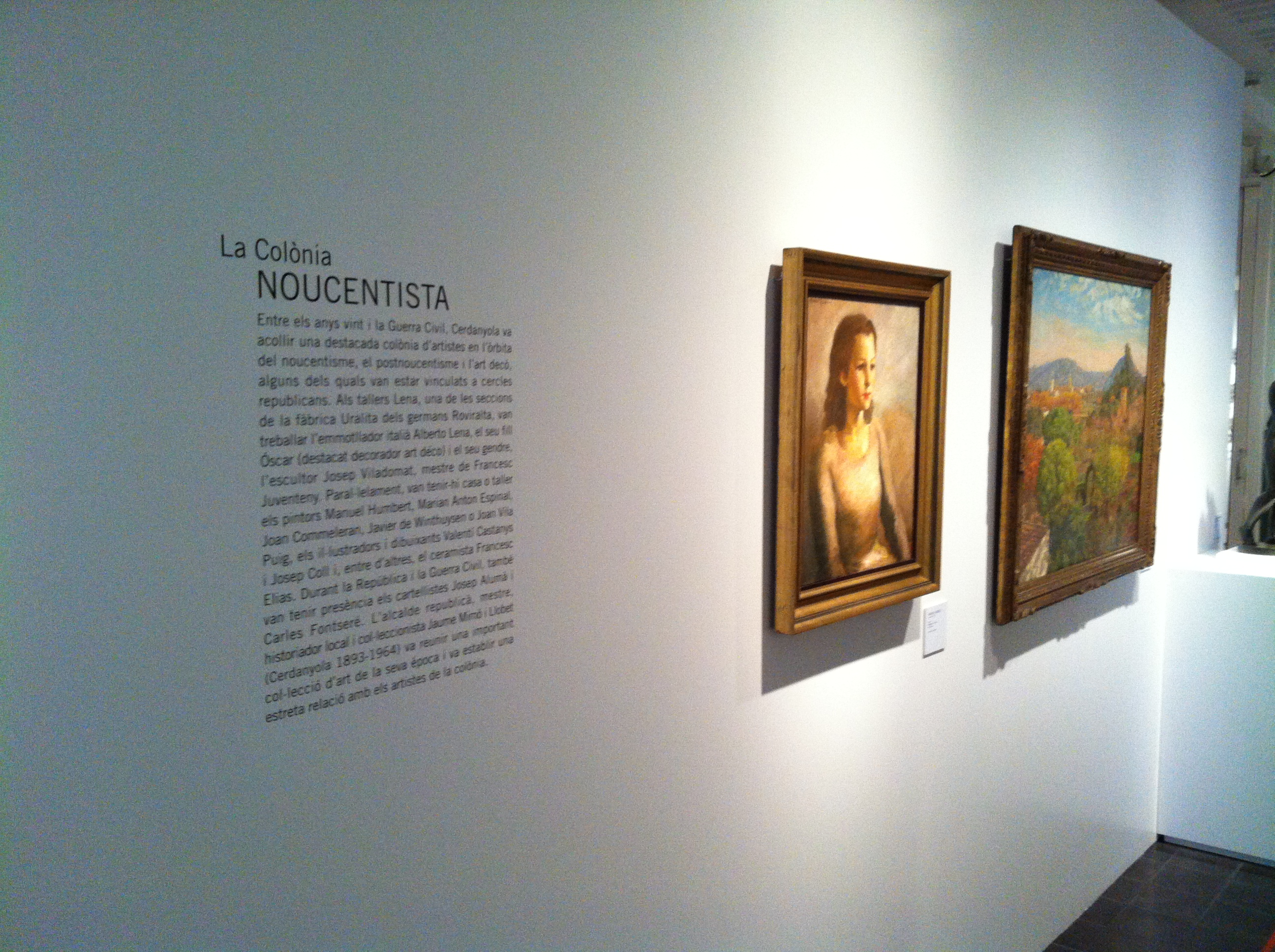 La colònia noucentista